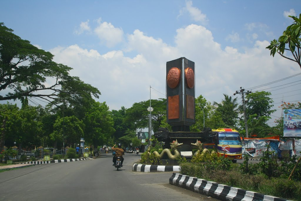 Tugu Adipura di Jalan Jendral Ahmad Yani Blora